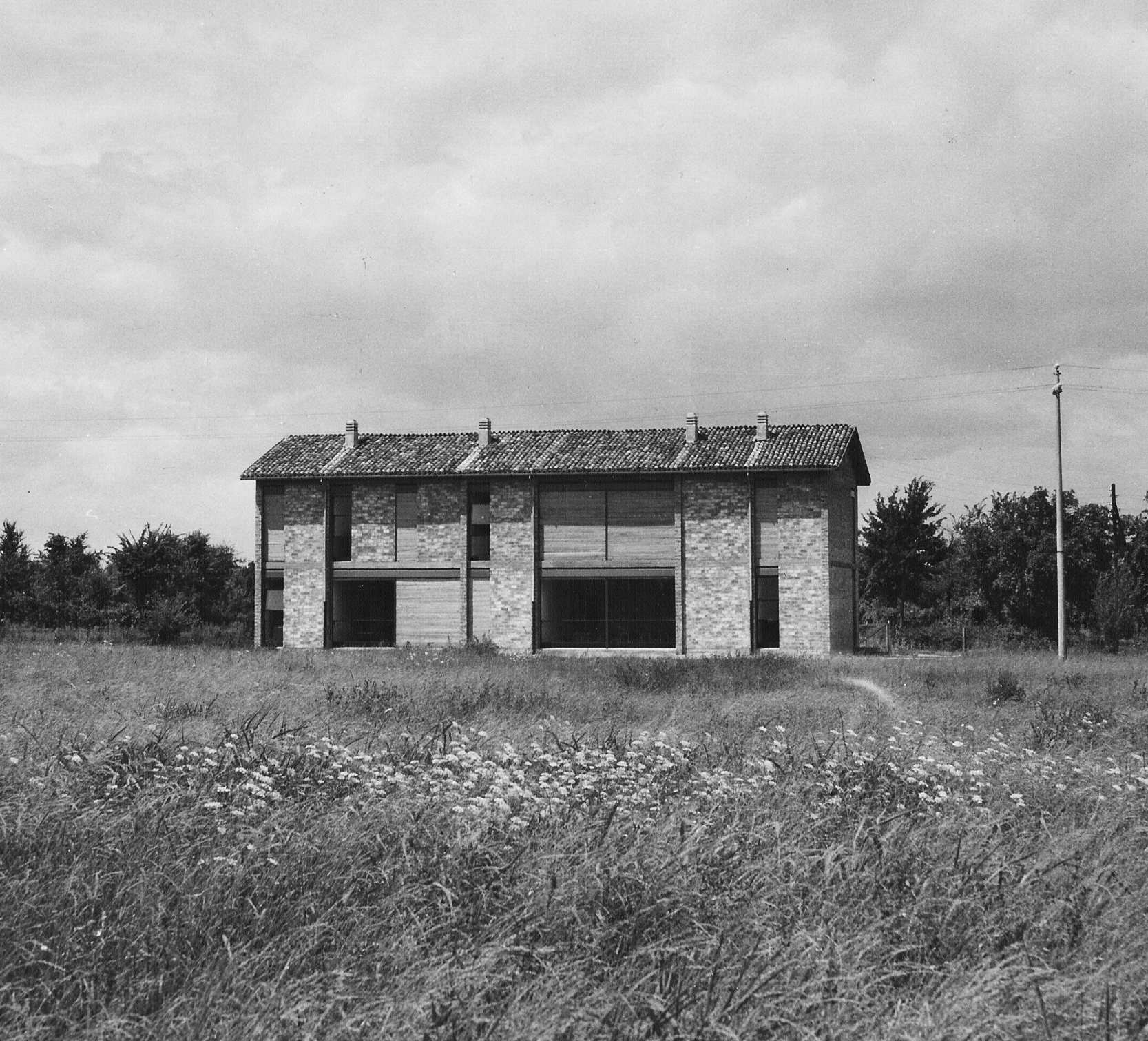 La costruzione sorge in una località a sud della via Emilia, in mezzo ai campi di grano e di olmi vitati, in un ambiente caratteristico della pianura emiliana, cui questa architettura appartiene allo stesso modo di quella tradizionale, da cui derivano la scala dimensionale, il semplice e evidente impianto strutturale, la tecnica costruttiva e i materiali del luogo.